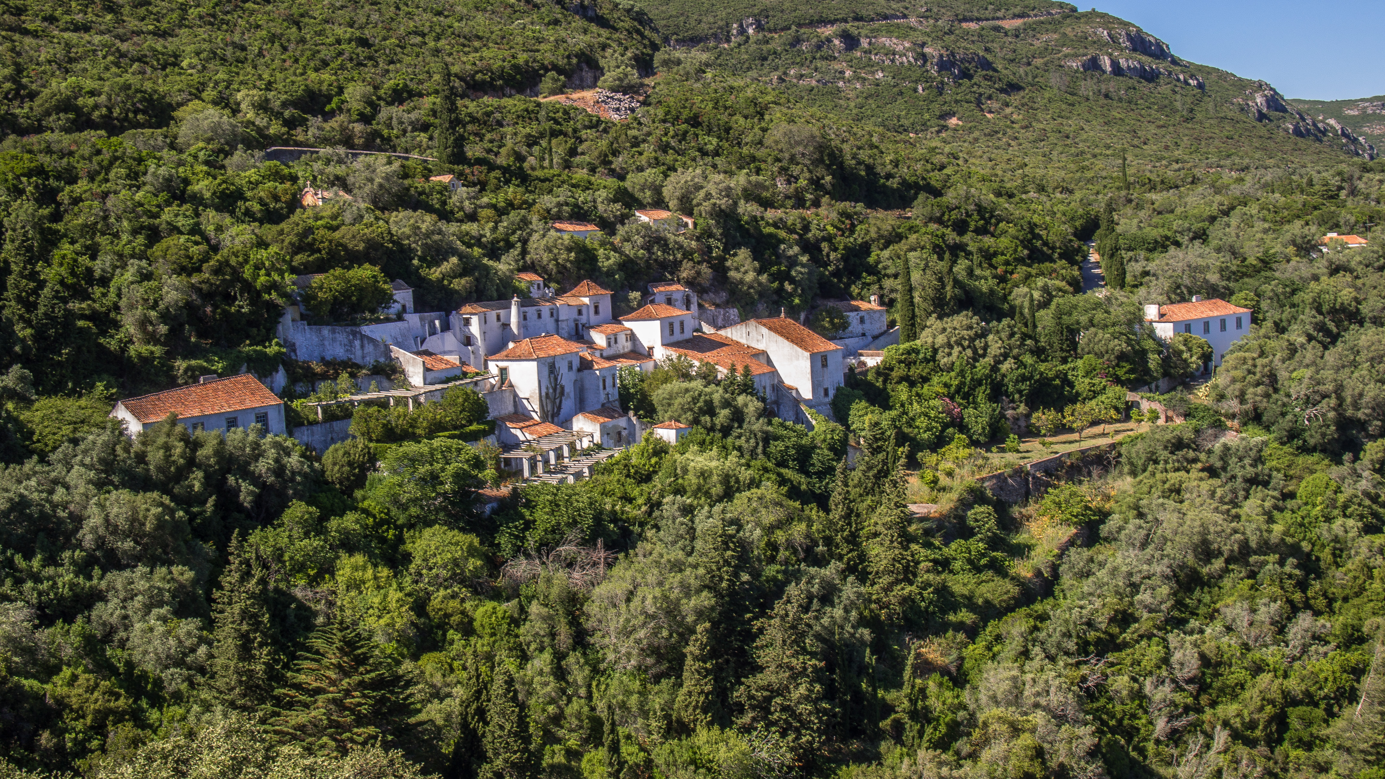 Arrábida/Espichel This is a photography of a Site of Community Importance in Portugal with the ID: PTCON0010. Natura2000 entry, EEA entry